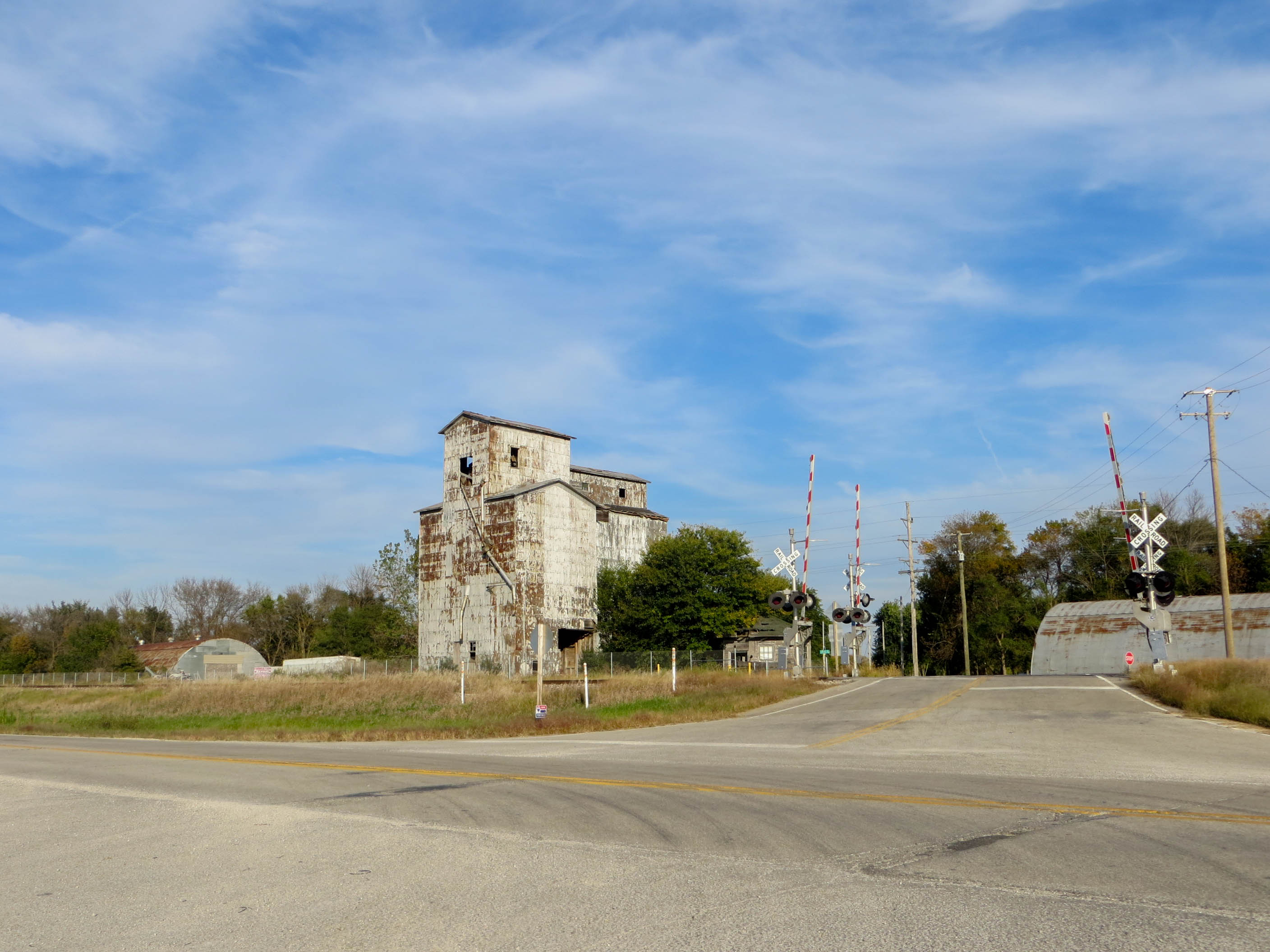 Grain elevator in Cayuga, Illinois